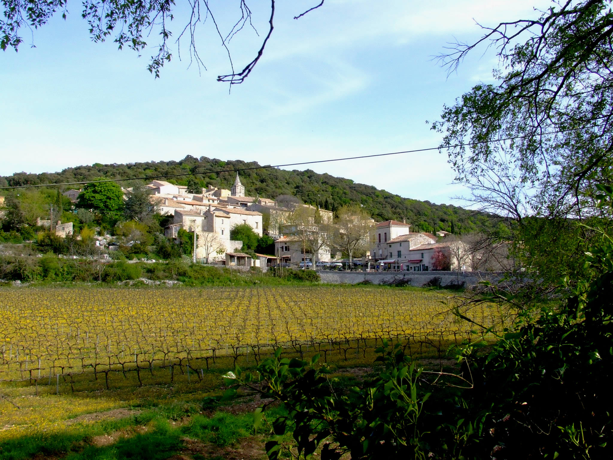 Village de Bidon (Ardèche), sur la colline